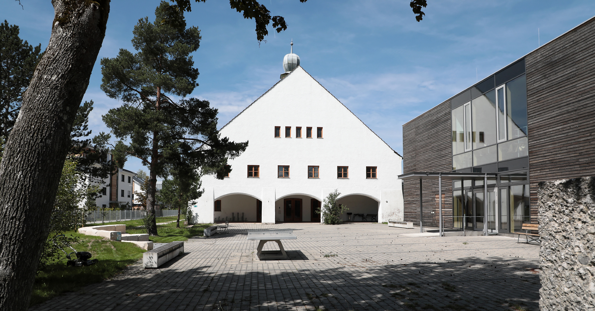 Links ursprüngliches Hauptgebäude des Spätberufenenseminars St. Matthias, rechts das neue Schulgebäude